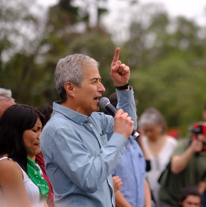 Mario Aguilar Arévalo